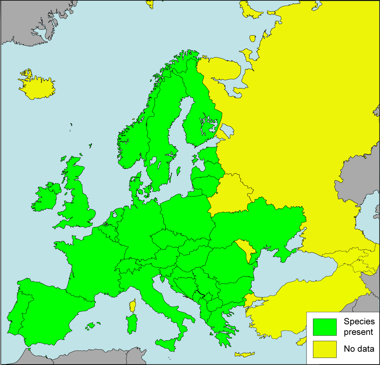 Valvata piscinalis, prosobranch freshwater snail species: presence in European countries based upon data from: Fauna Europaea: Valvata piscinalis